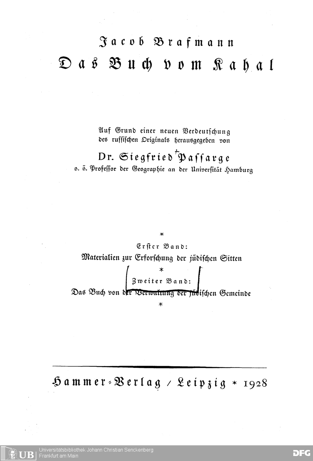 Jacob Brafmann Das Buch vom Kahal. Auf Grund einer neuen Verdeutschung des russ. Originals hrsg. von Siegfried Passarge